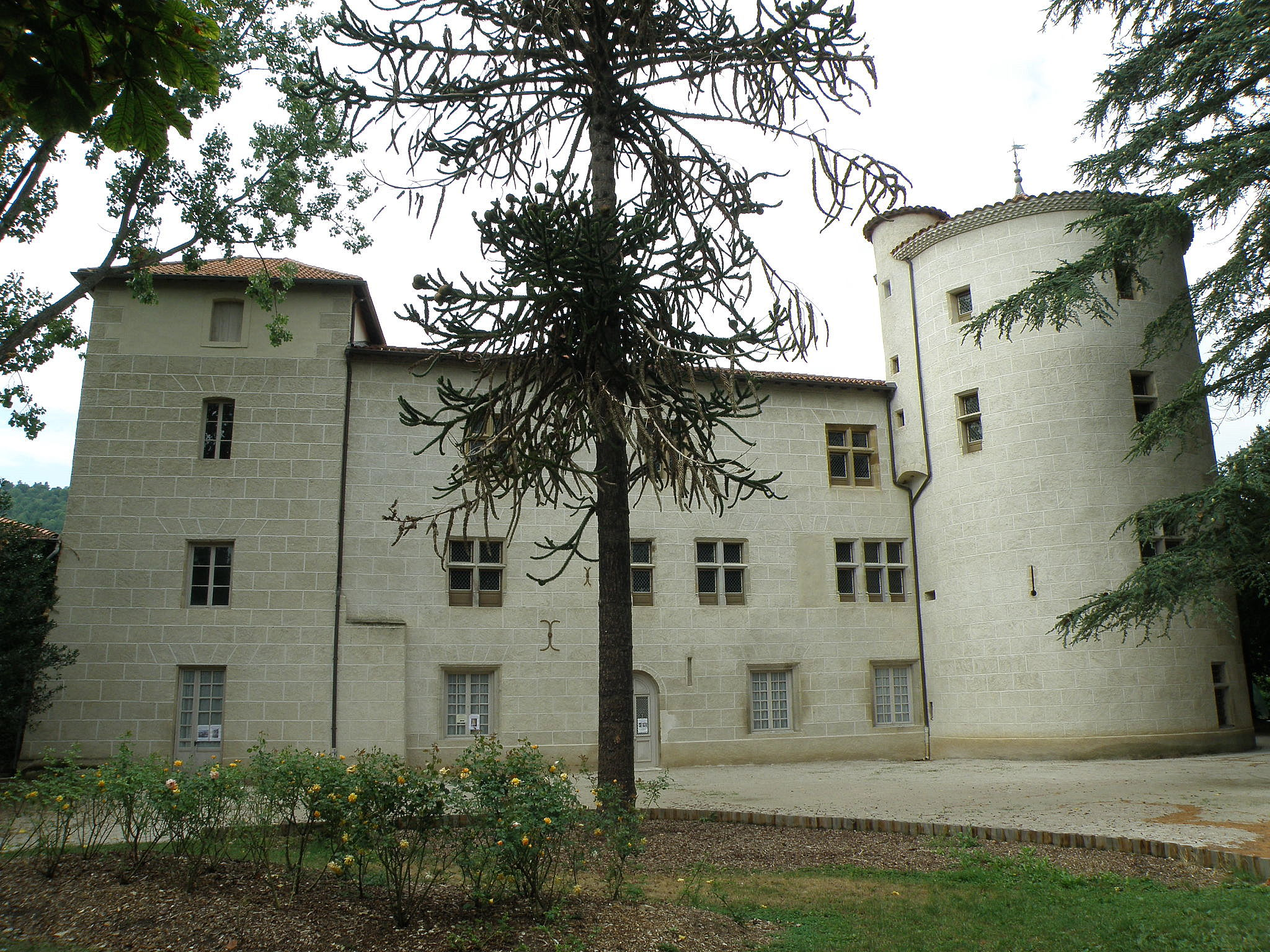 Aurec-sur-Loire, dép. de la Haute-Loire, France (région Auvergne). Château seigneurial d'Aurec, façade sud (côté jardin, devenu jardin public).